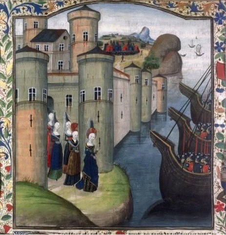 Jeanne de Flandre